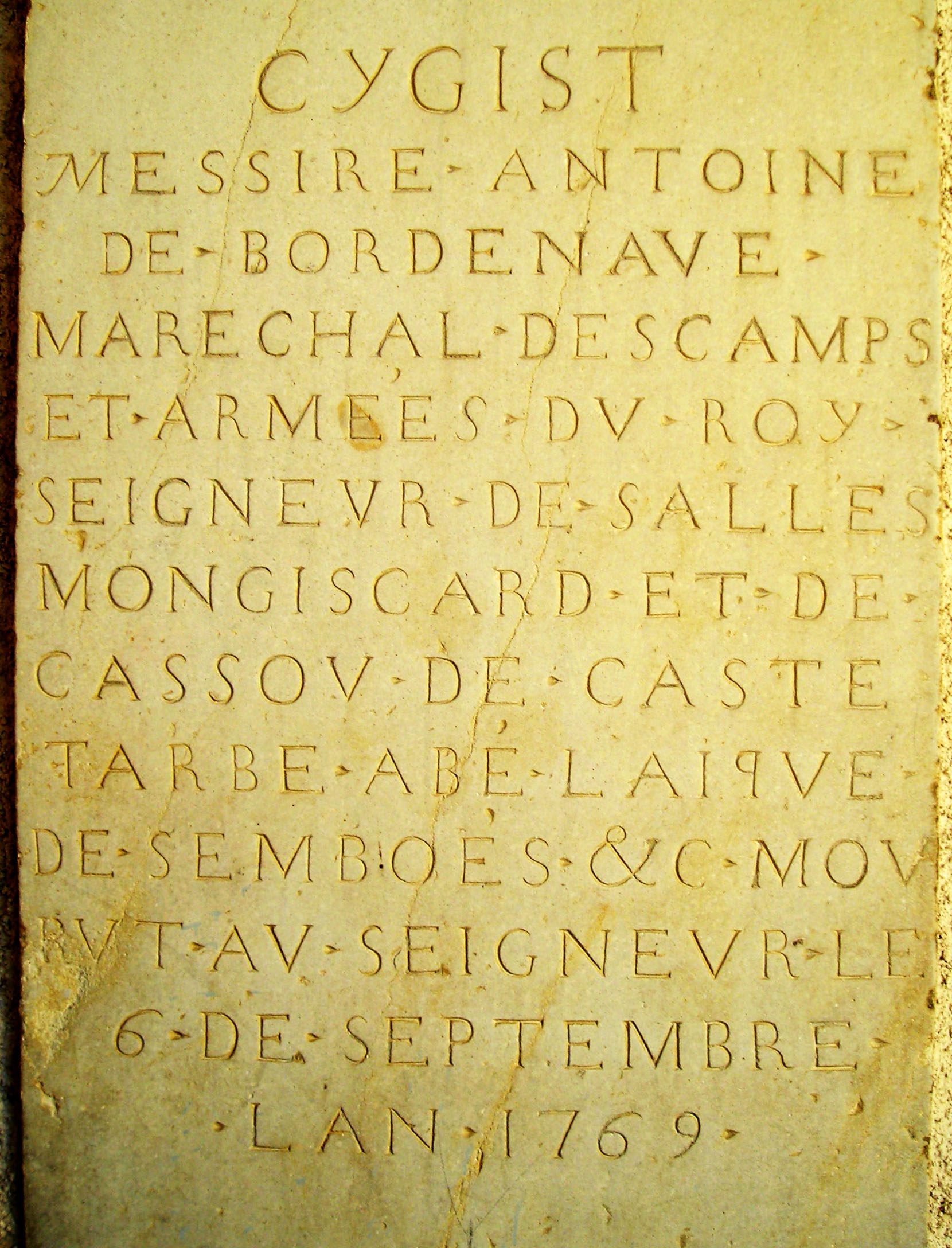 Inscription lapidaire sur une pierre tombale, dans le porche de l'église de Saint-Boès (64)